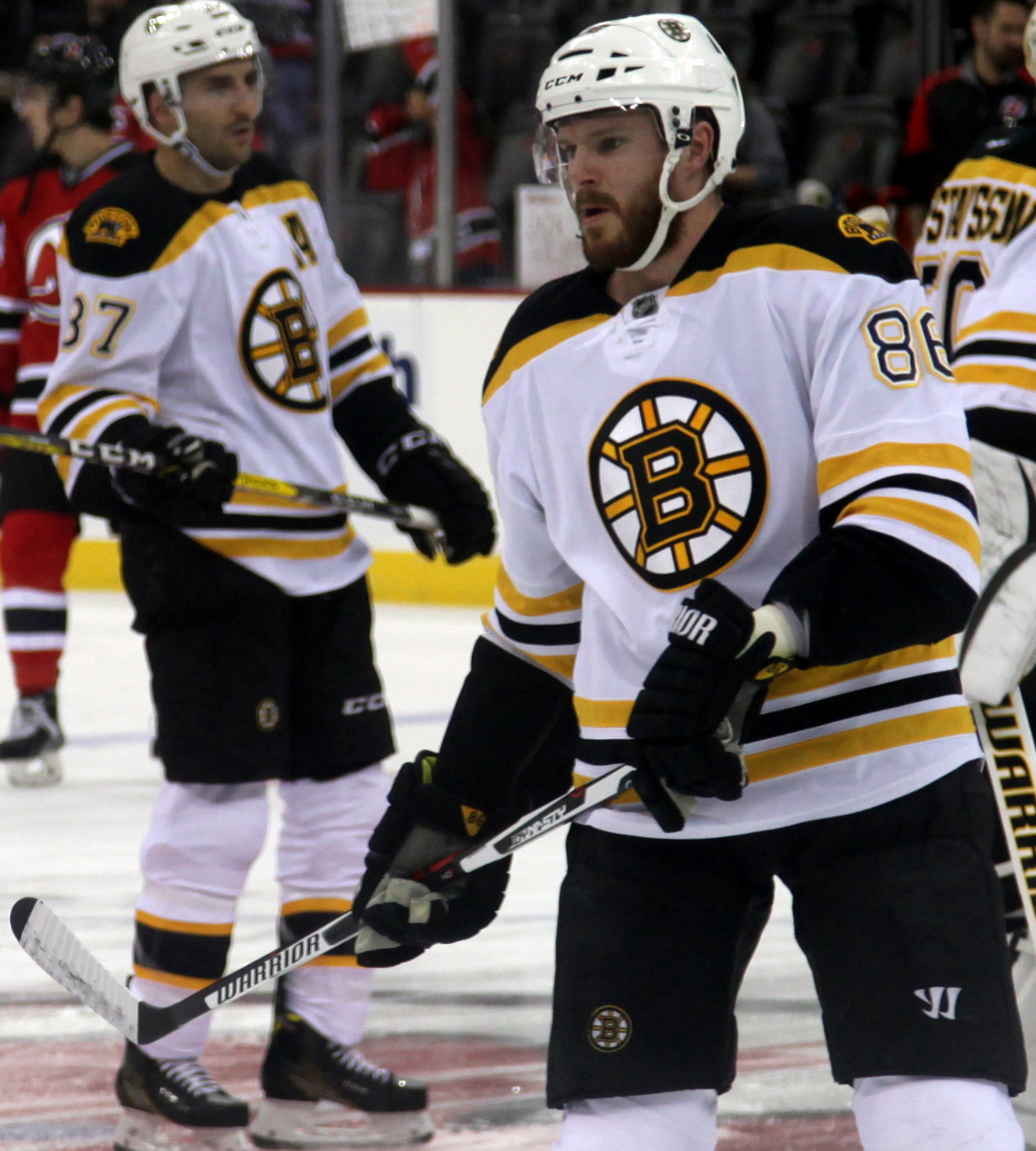 Kevan Miller in March 2016